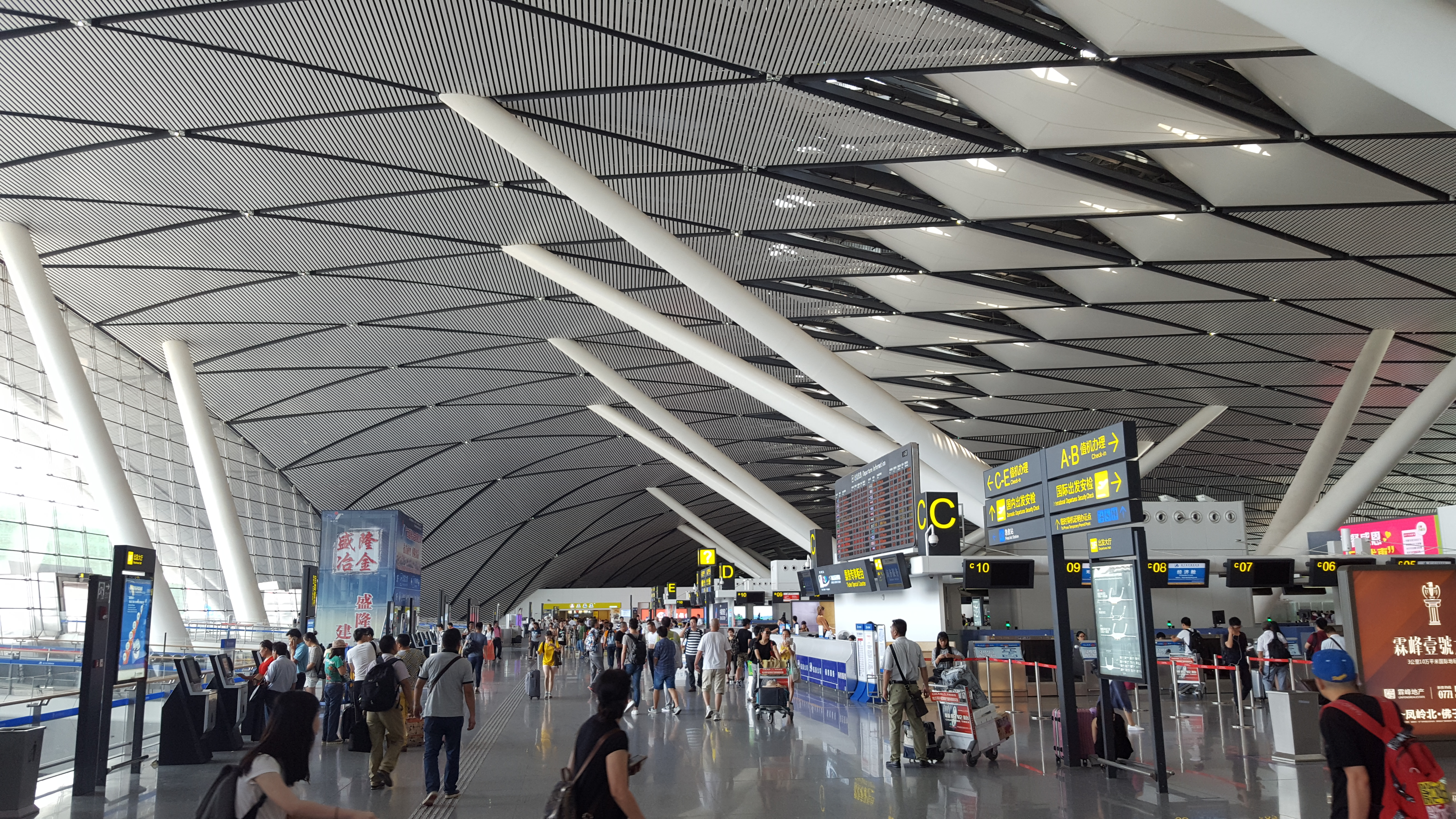 зона вылета - центральный зал